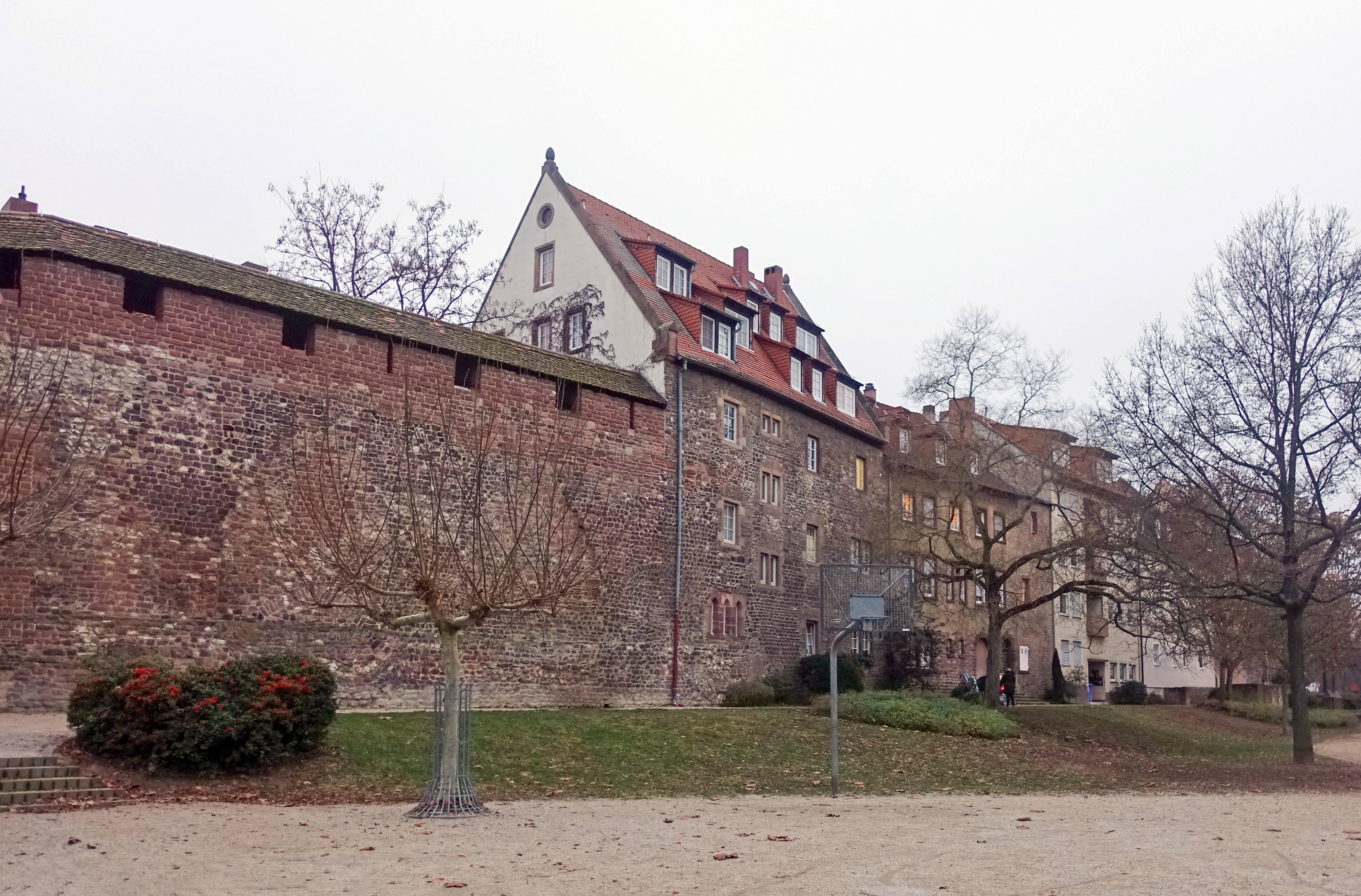 Die Rückseite der Häuser in der Judengasse mit den Fensterdurchbrüchen. Aufnahme von der Herta-Mansbacher-Anlage am Berliner Ring in Worms, Rheinland-Pfalz.